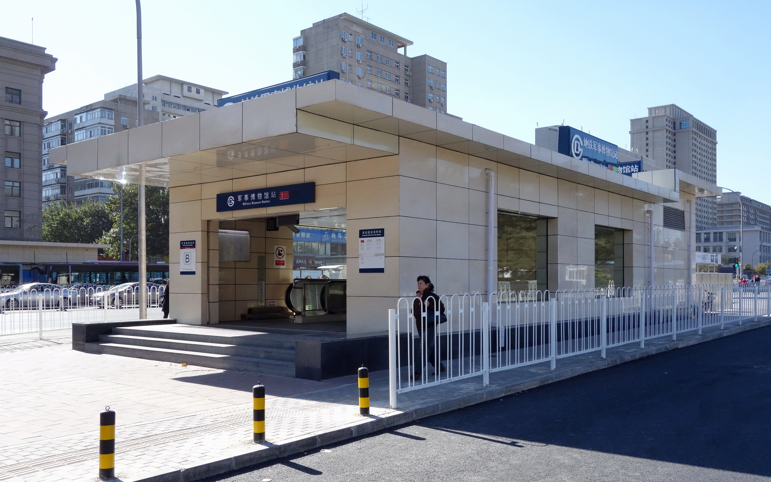 军事博物馆站东北 (B) 出入口